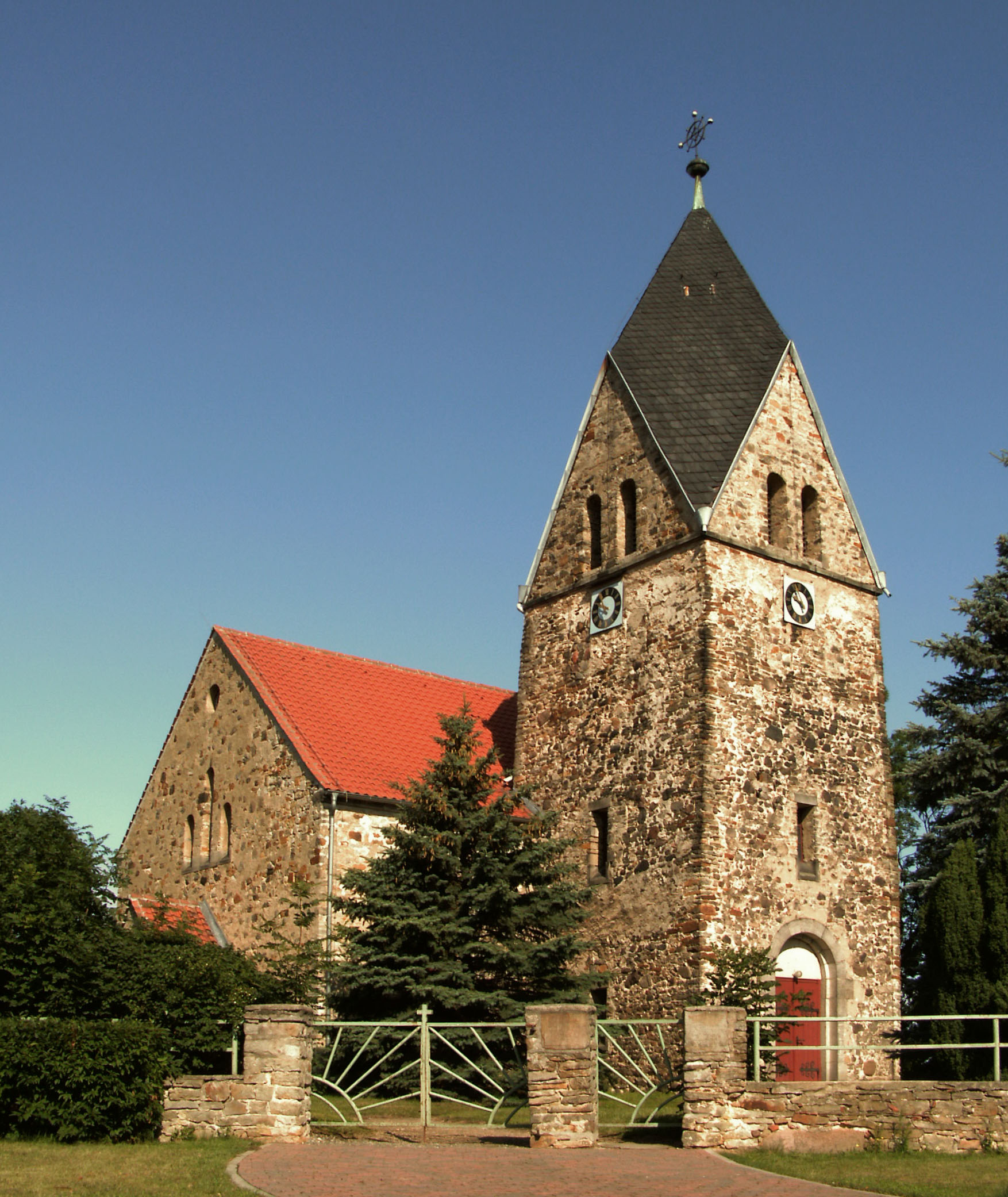 Evangelische Kirche in Bösdorf bei Oebisfelde (Sachsen-Anhalt)